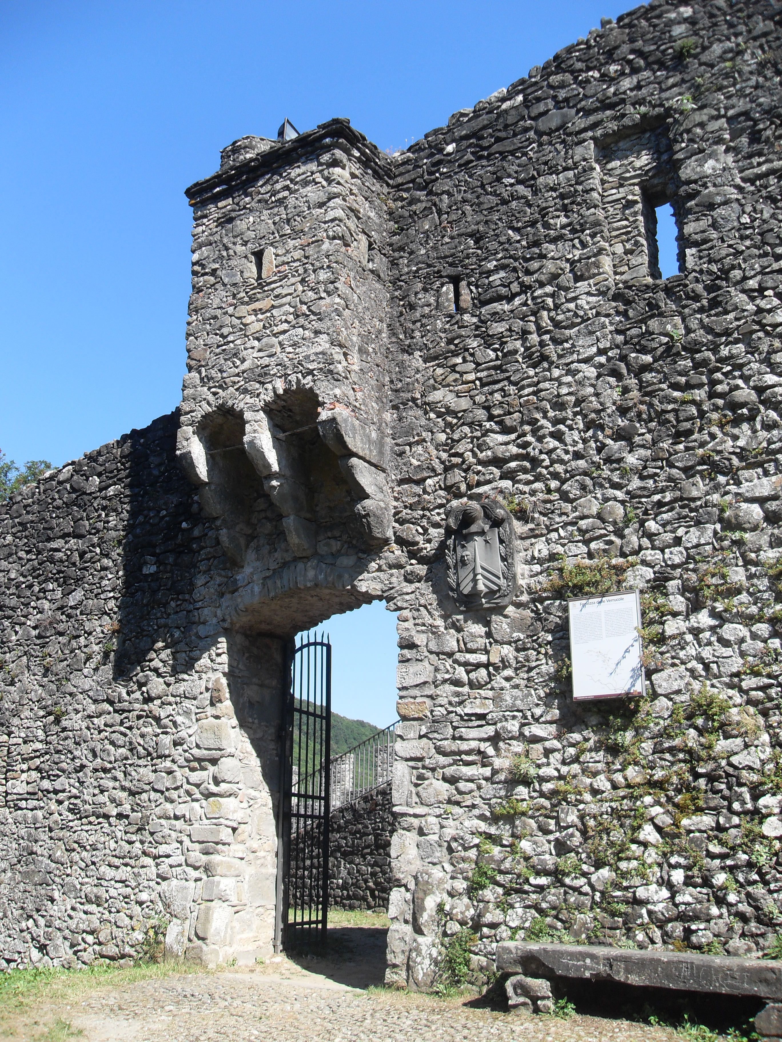 Entrance to Verrucole Castle